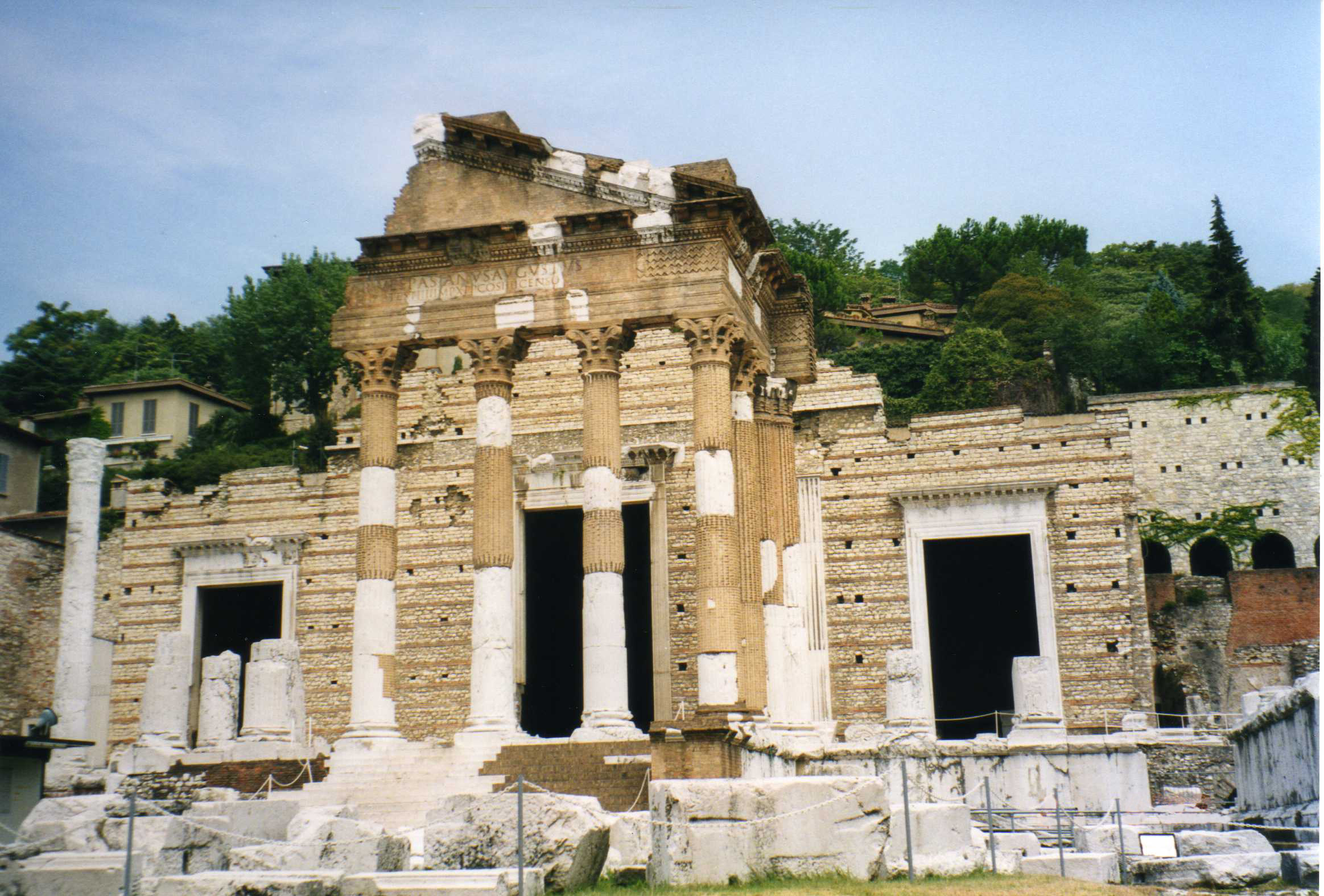 Particolare del settore restaurato del Tempio Capitolino a Brescia, nell'ex Foro Romano. Fu costruito nel 73, imperante Vespasiano. Autore Giorces.